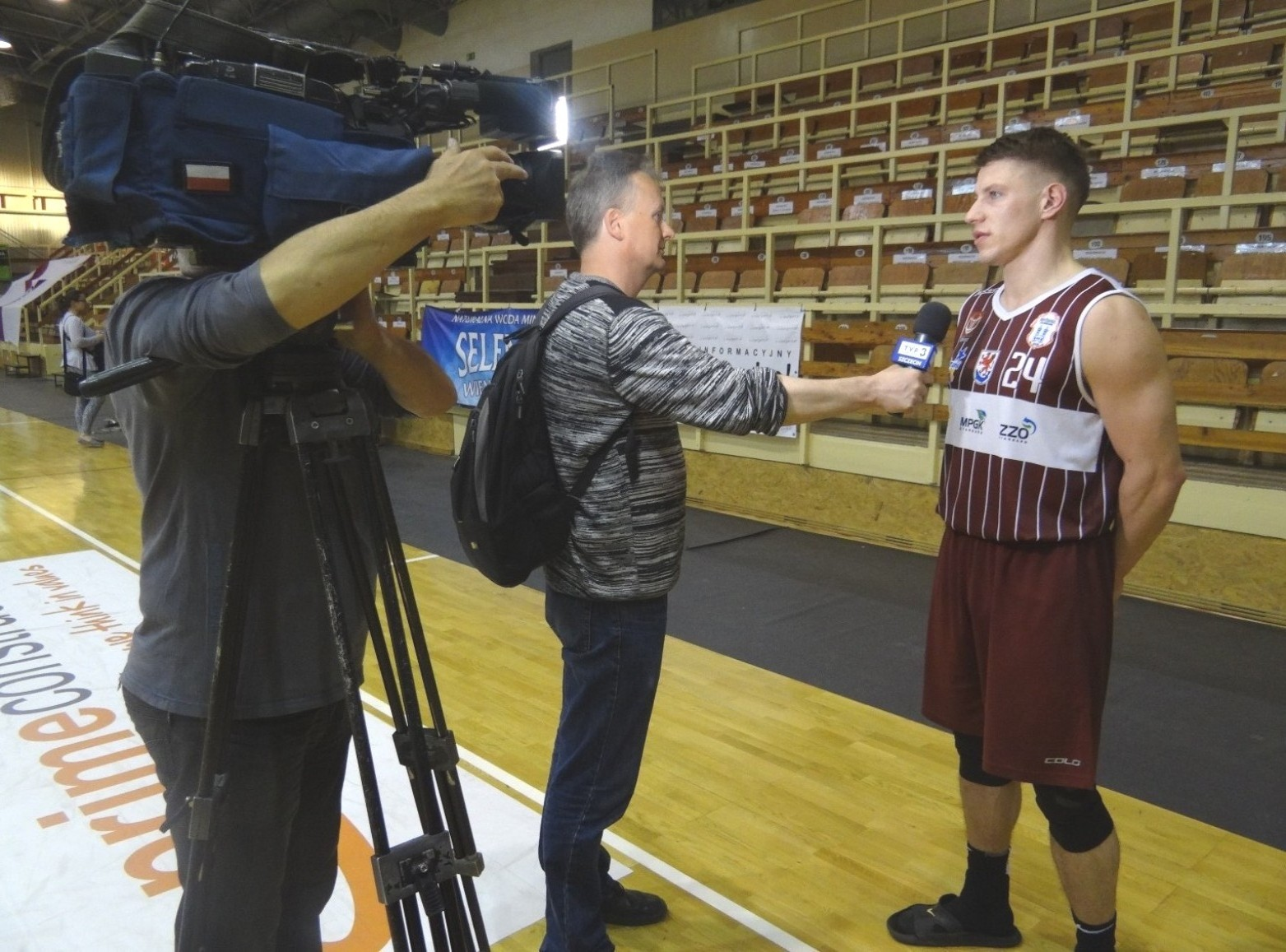 Wywiad Marcina Dymały dla TVP3 (29.04.2018)